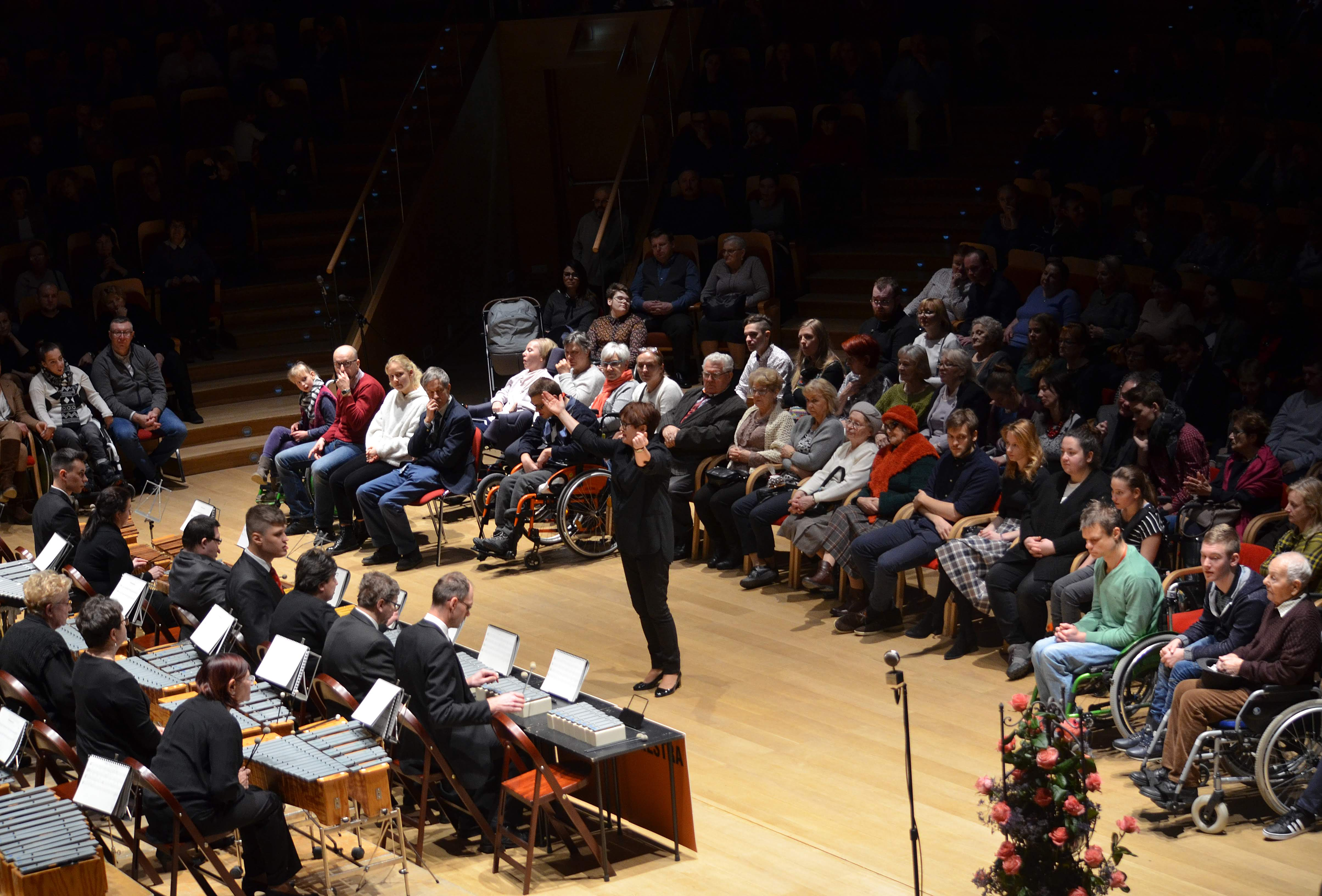 Orkiestra Vita Activa - koncert w Polskiej Filharmonii Bałtyckiej, dyrygentka Mirosława Lipińska